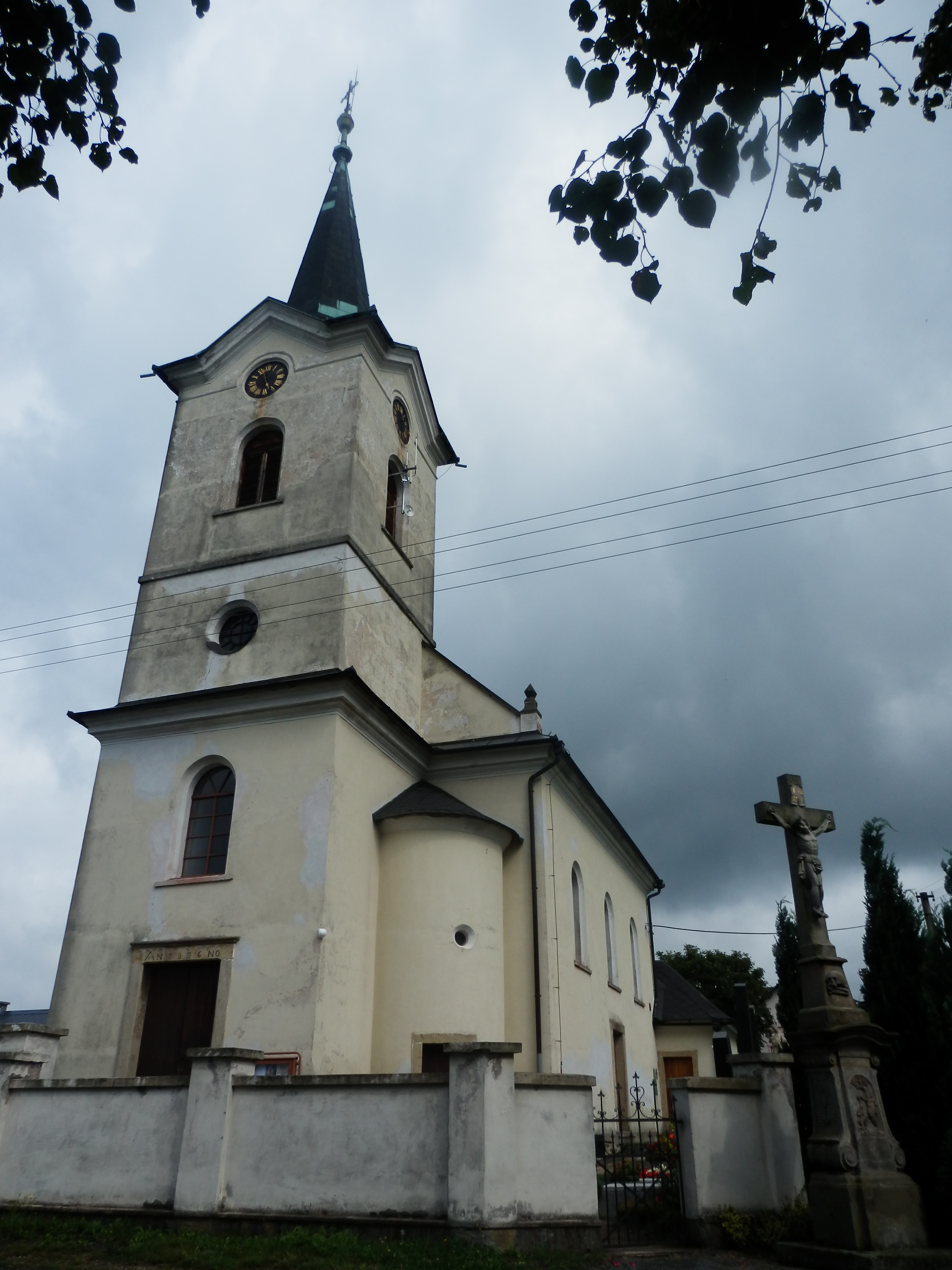 Kostel svatých Jana a Pavla, Mistrovice.